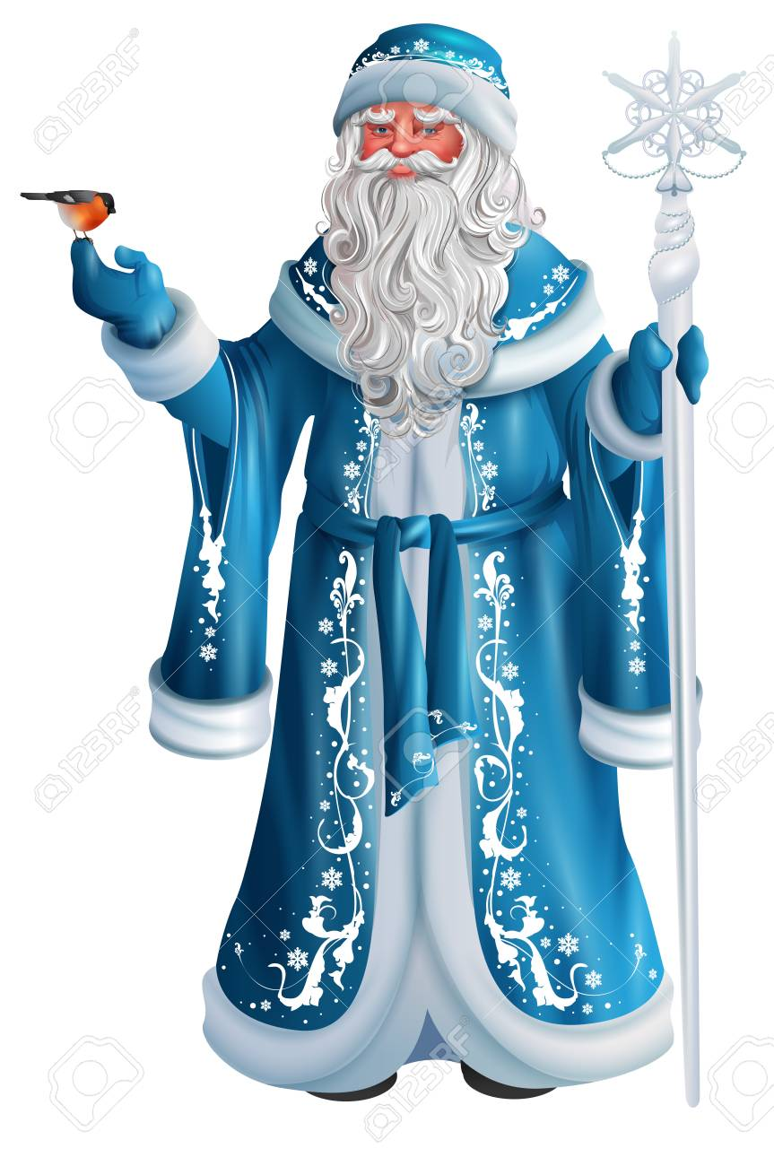 Azərbaycan şaxta babası 2018